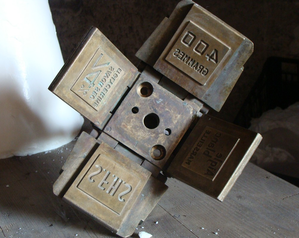 Une forme de fabrication du savon de Marseille à la Savonnerie du Midi, aux Aygalades (Marseille 15e arr.).